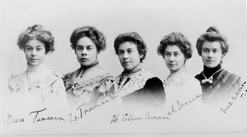 Сёстры ГнесиныФотография российских музыкантов сестёр Гнесиных